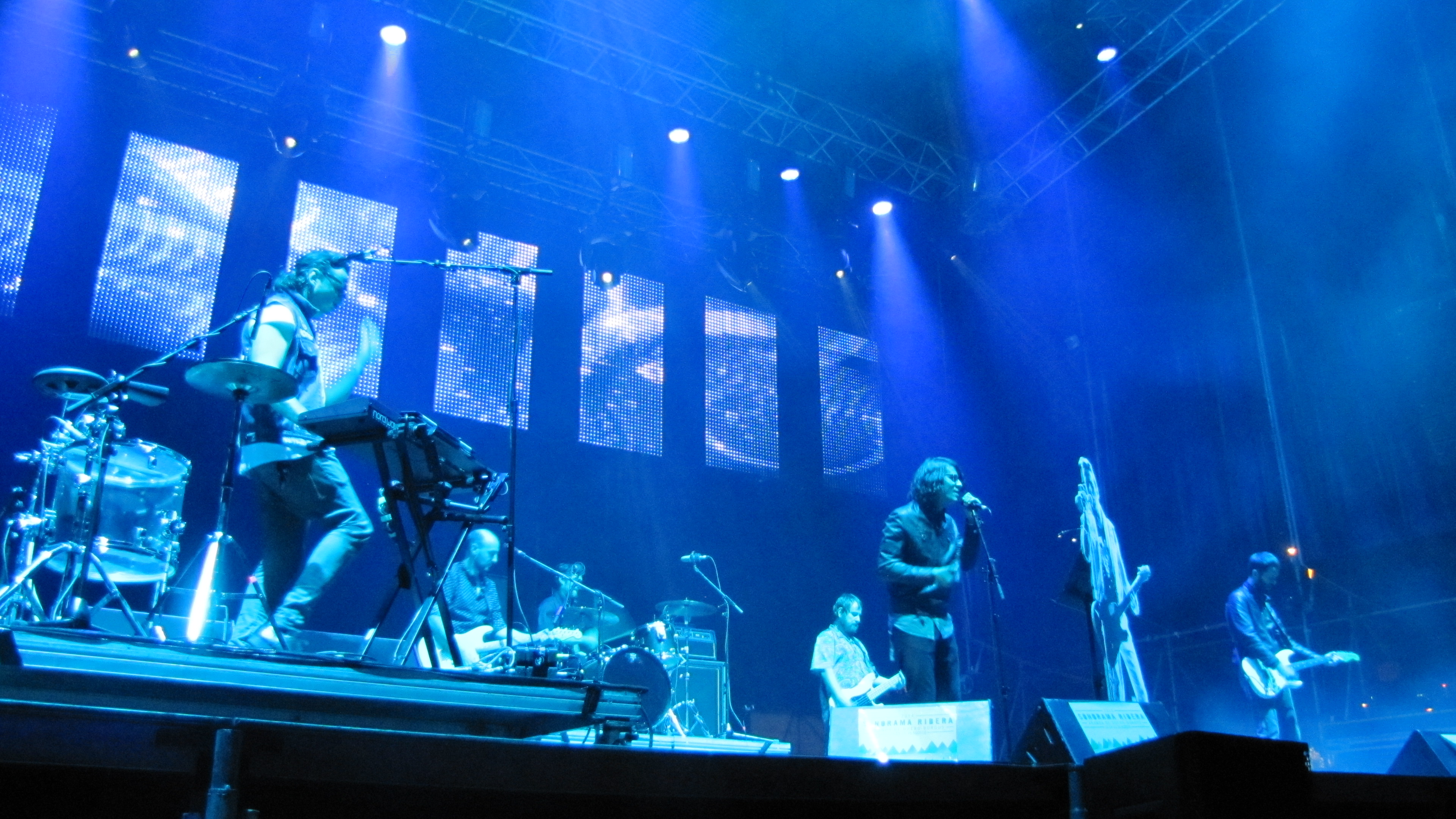 We Are Standard (con tributo a The Clash) Sonorama 2014 (Aranda de Duero)